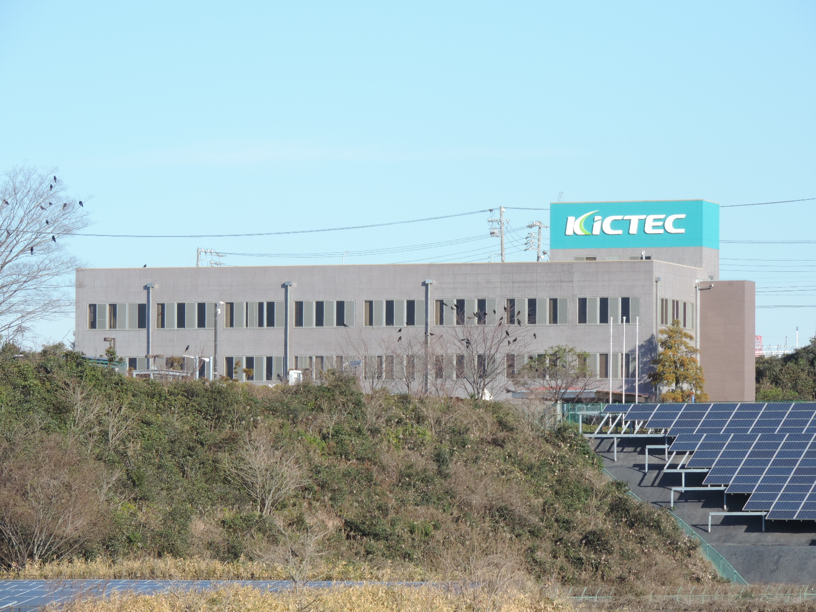 キクテック中部事業所（愛知県阿久比町,2020年1月撮影）